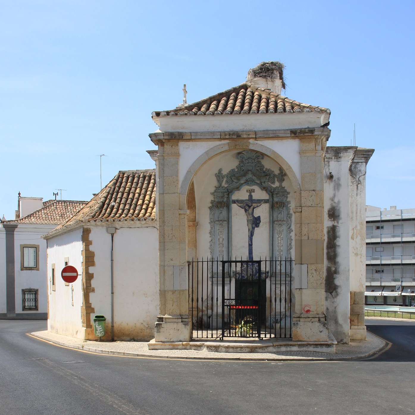 Pe da Cruz, Faro, Algarve, Portugal